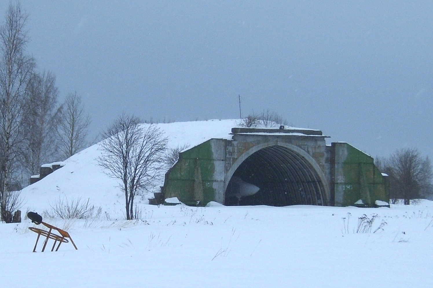 Капонир на аэродроме Сиверский